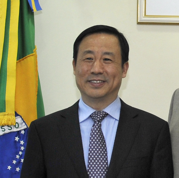 18/05/2015, Brasília - DF Fotos: PH Freitas